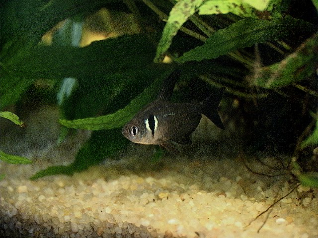 Fantome noir